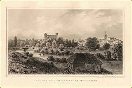 Dobeles pilsdrupas un Todlēbena villa 19. gadsimtā (W.S. Stavenhagen).